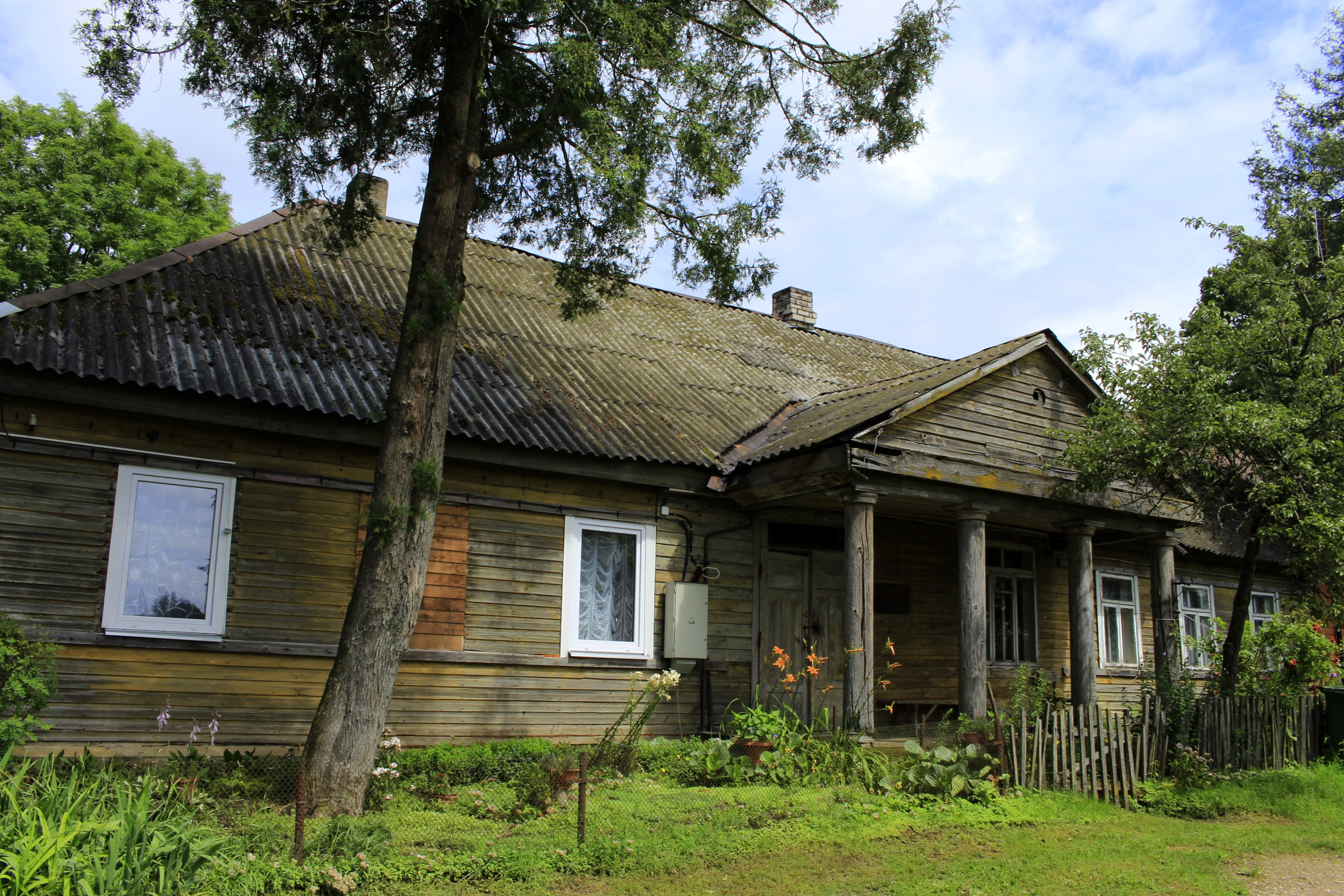 Ustronės dvaras